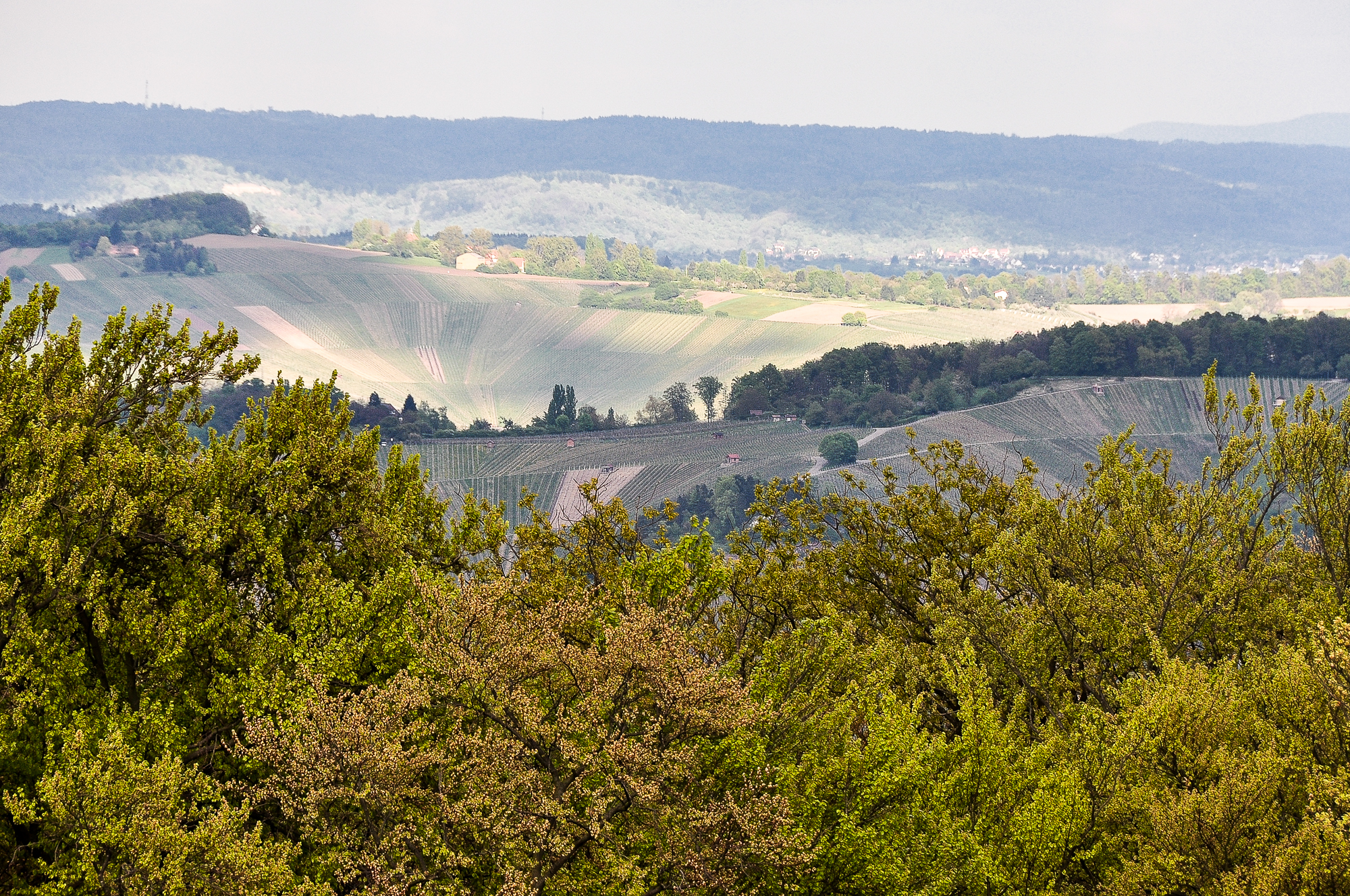 Der Blick geht über das Strümpfelbachtal, das Beutelsbachtal zum Remstal und die es begrenzende Buocher Höhe. LSG „Kappelberg, Kernen, Haldenbach-, Strümpfelbach- und Beutelsbachtal mit angrenzenden Höhen“